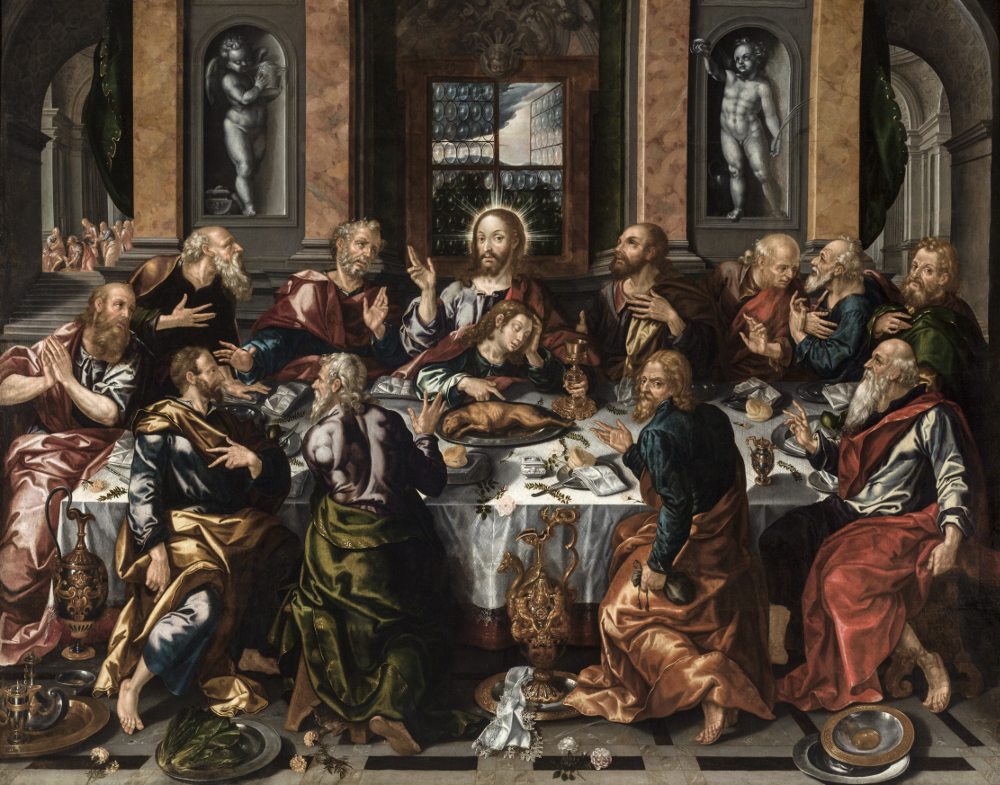 El lienzo representa la Última Cena, en la que Jesucristo cenó con sus discípulos en la noche anterior a su muerte.